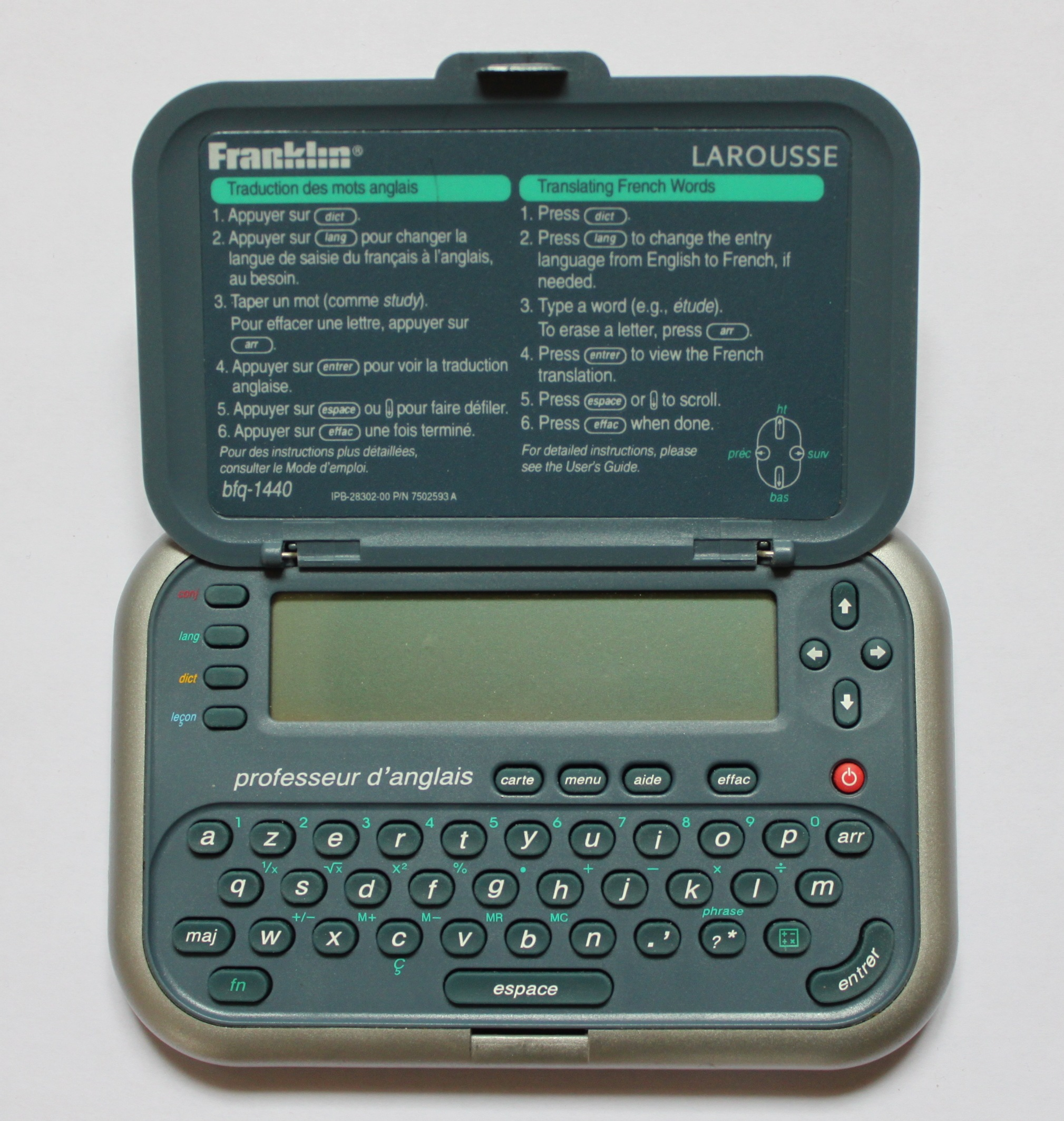 Larousse_Franklin2